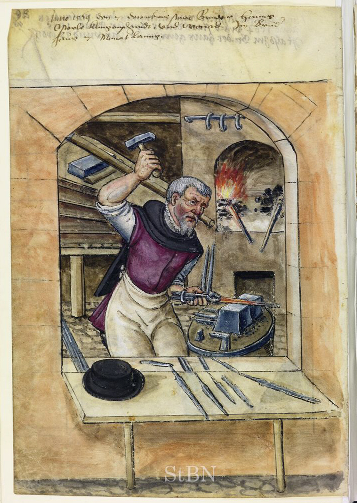 Transkription und weitere Informationen Hanns (Hans) Osterle (Osterle; Osterlein), Klingenschmidt (Klingenschmied)